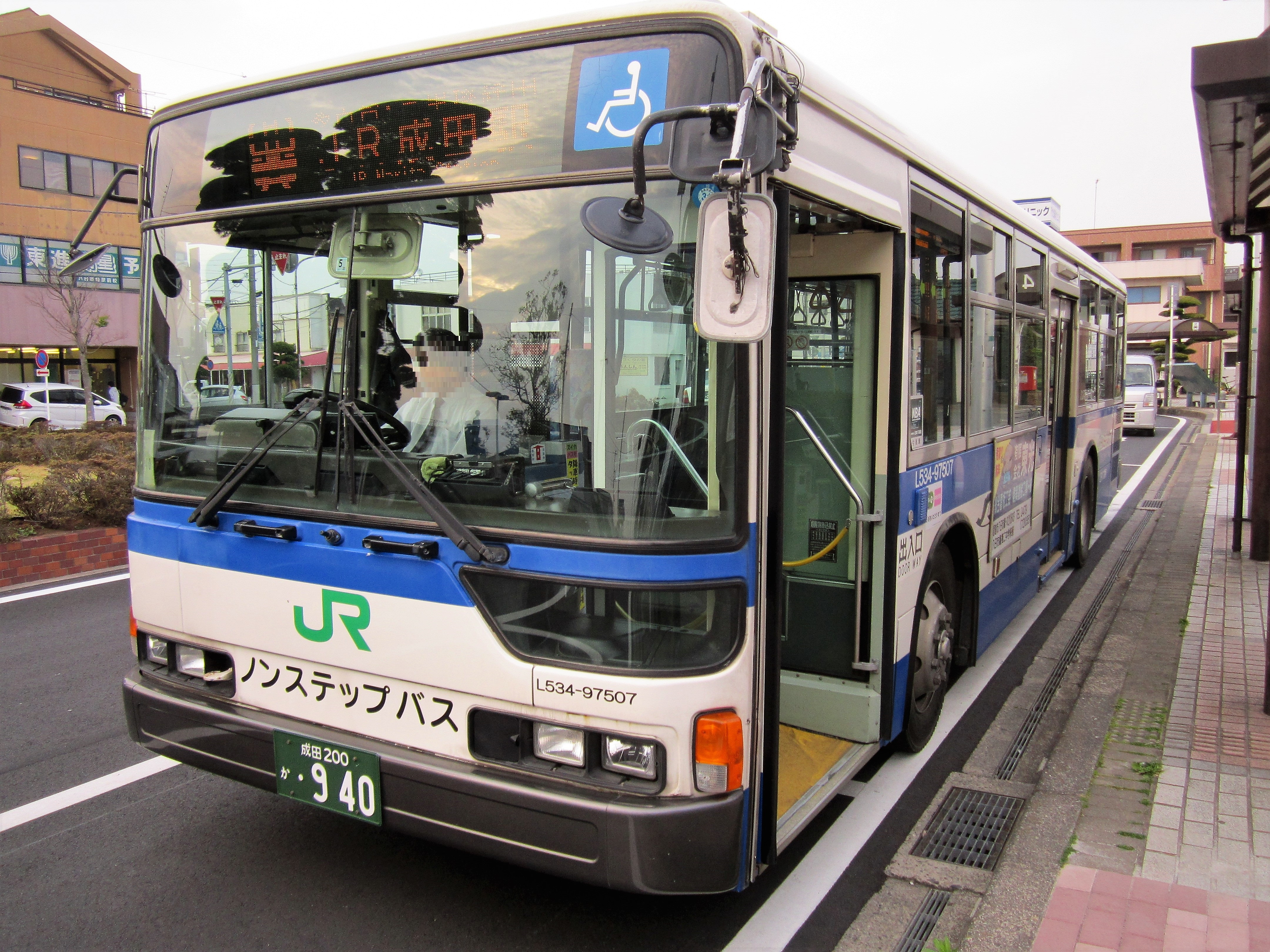 八日市場駅前に停車中のジェイアールバス関東のバス Canon PowerShot A2200